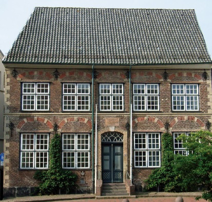 Holländisches Haus in Schleswig, erbaut von Johann Daniel Freins von Nordstrand, Gallberg 3